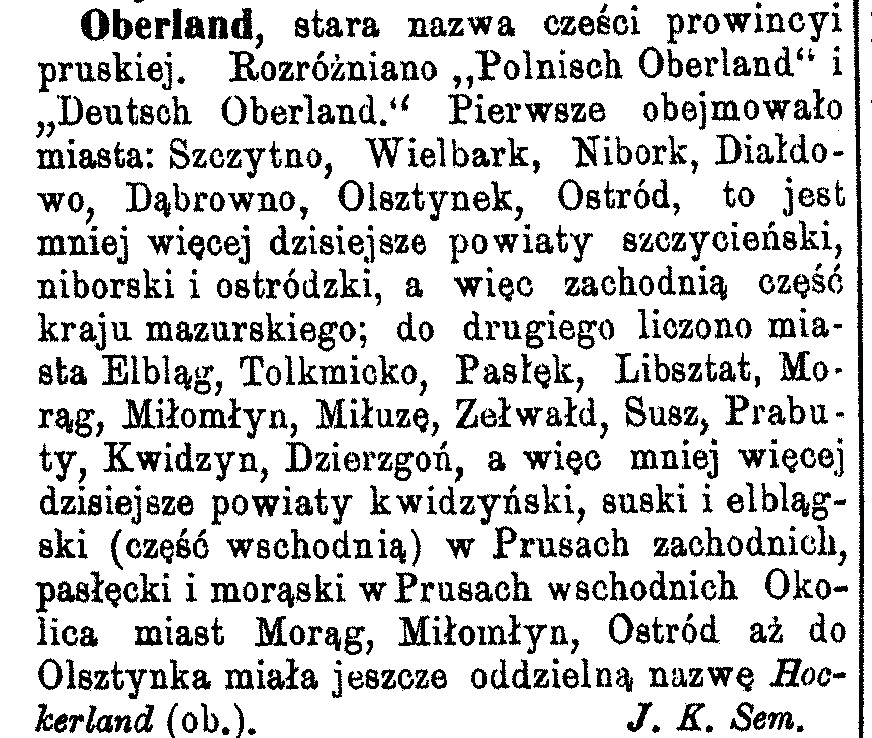 Hasło "Oberland" (dziś Prusy Górne) ze "Słownika geograficznego Królestwa Polskiego i innych krajów słowiańskich", tom VII, str. 322 (Warszawa, 1886)